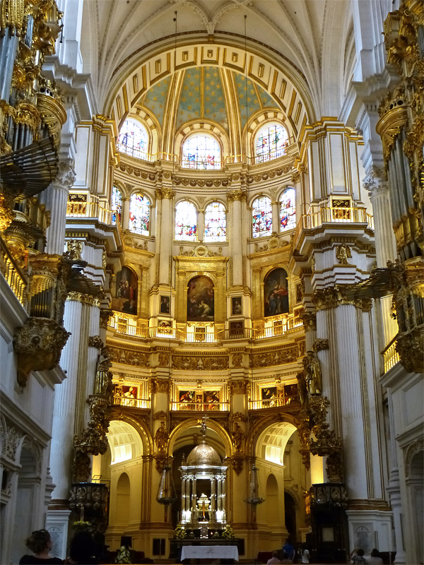 Catedral de Granada, Andalucía, España.